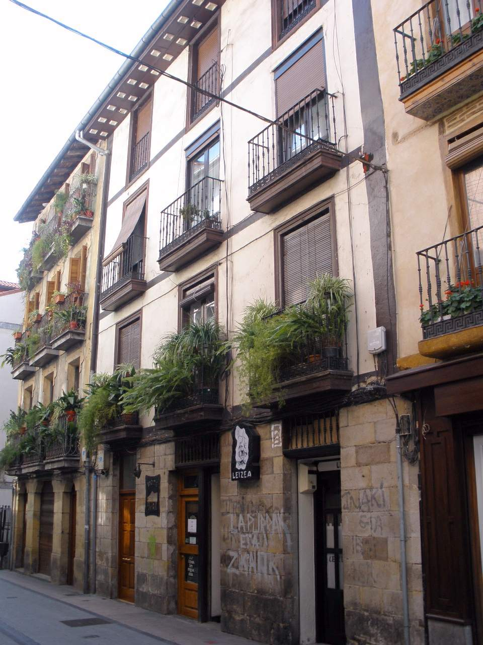 Ordizia, Guipúzcoa